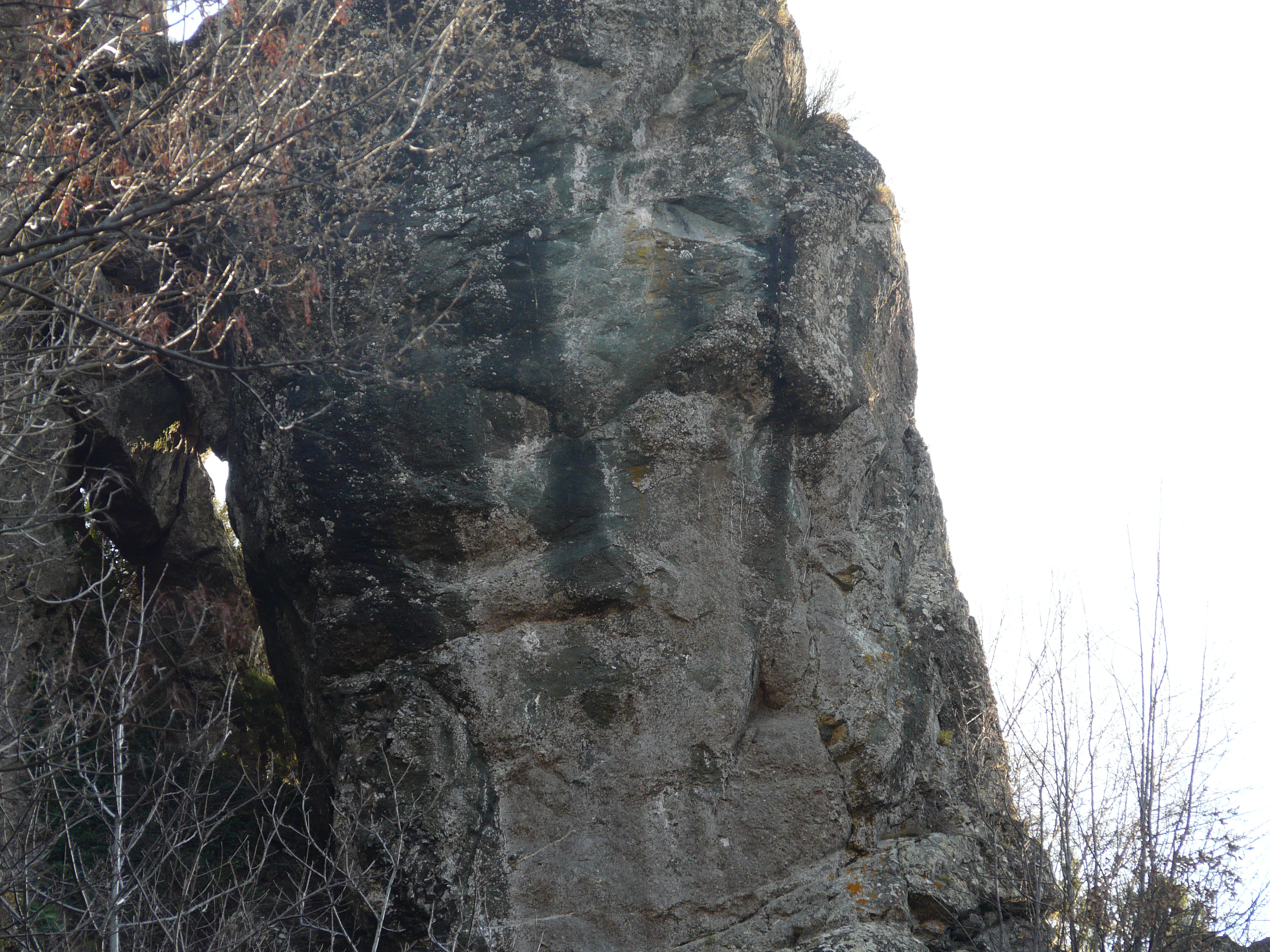 Il megalitico di Borzone, Comune di Borzonasca, Liguria, Italia